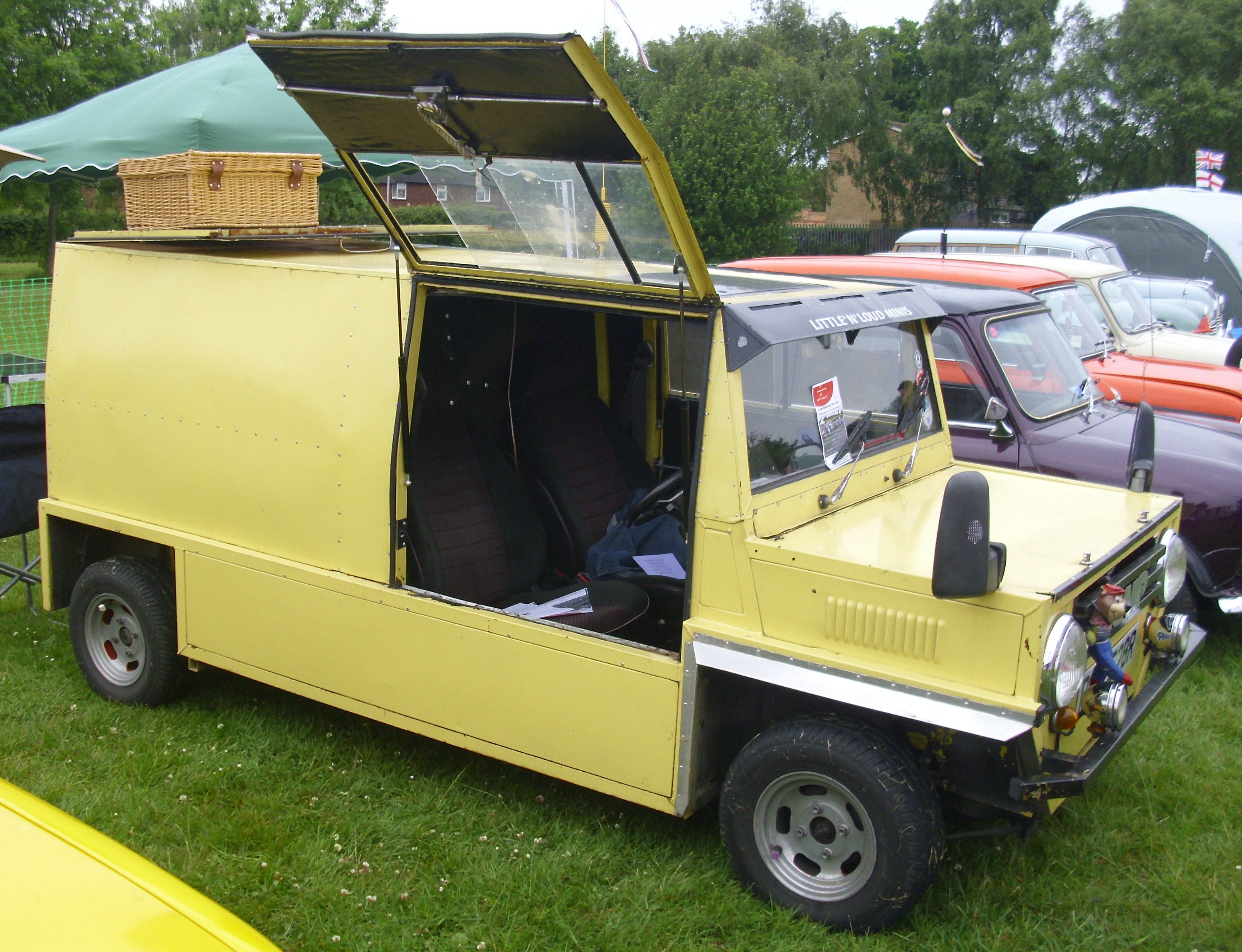 Scamp